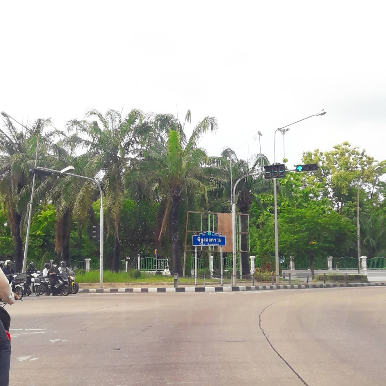 ทางแยกพิบูลสงคราม ในเขตบางซื่อ กรุงเทพมหานคร